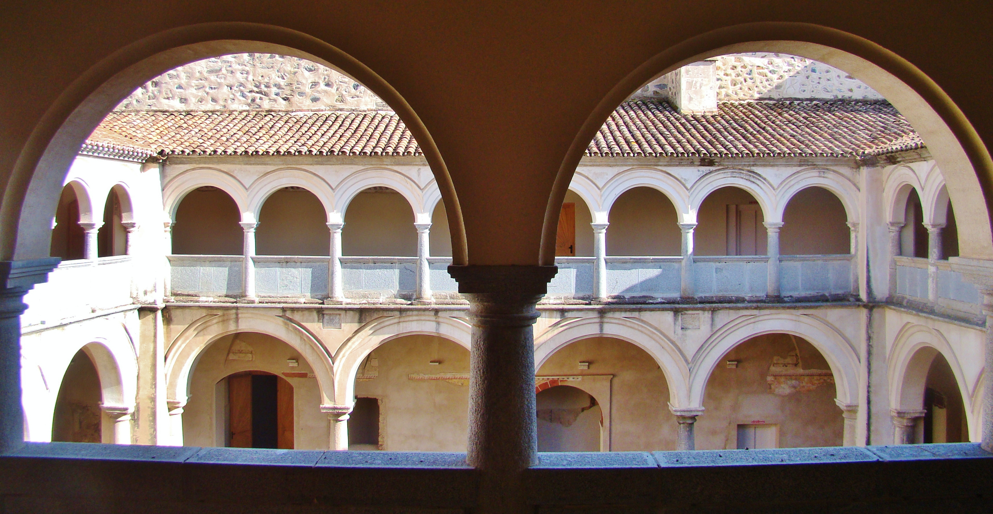 Claustro del Convento de San Francisco de Fregenal de la Sierra